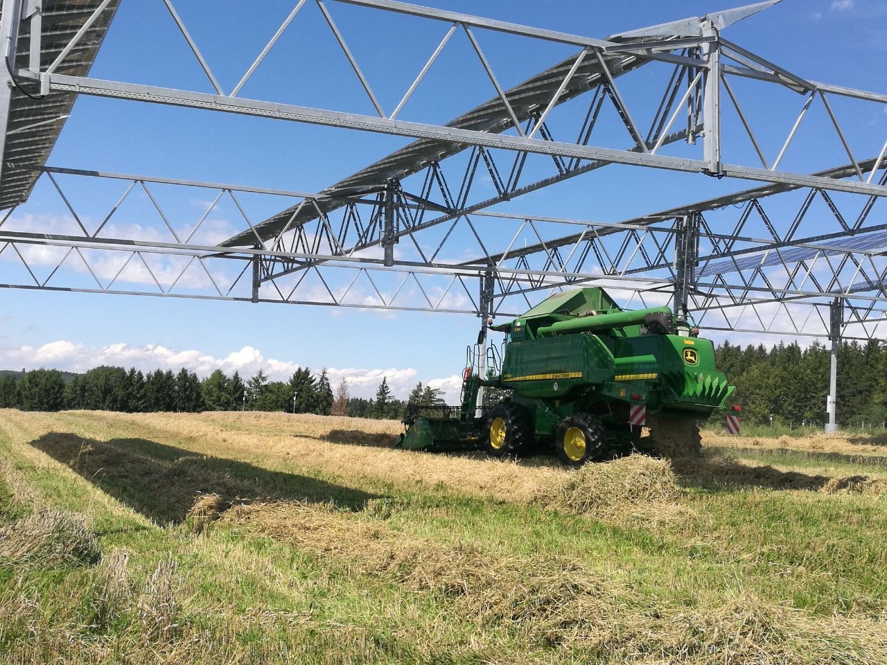 Ernte unter einer Agrophotovoltaikanlage, APV-Pilotanlage Heggelbach, Oberndorf in Herdwangen-Schönach.